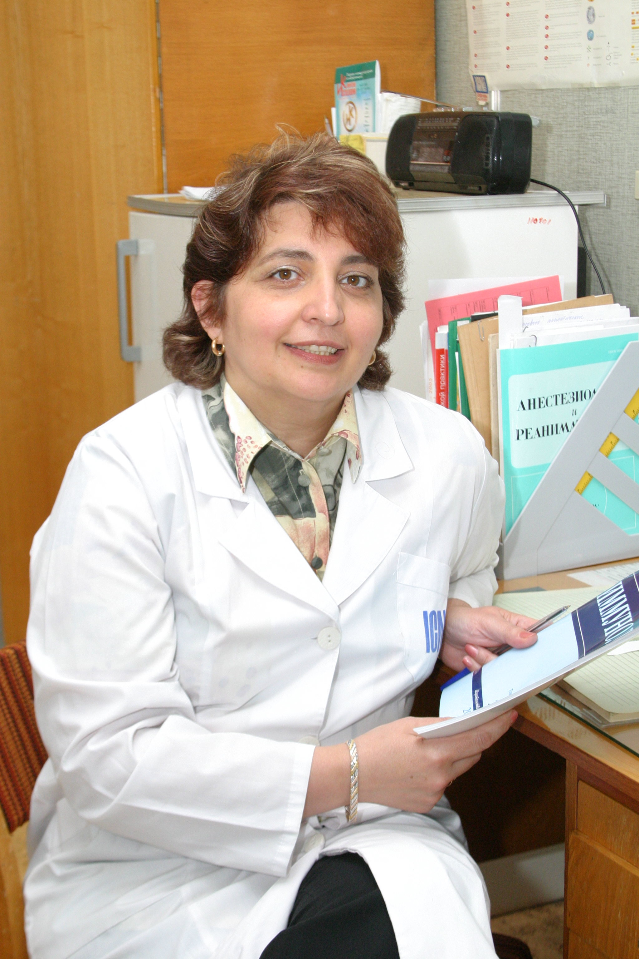 Карина Арменовна Бунятян (род. 1954) — иммунолог, доктор медицинских наук, с 1987 года работает в РНЦХ РАМН, главный научный сотрудник научно-клинической лаборатории.